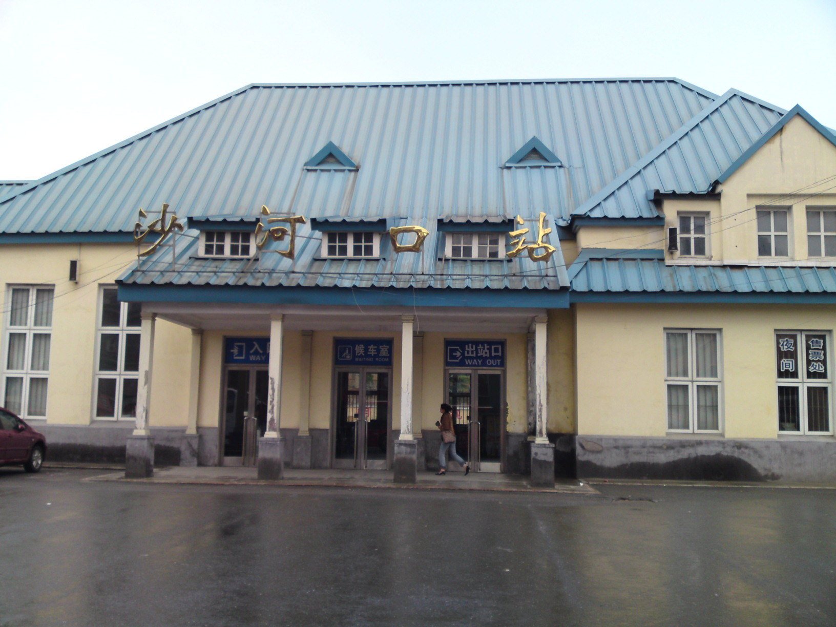 大連市沙河口駅